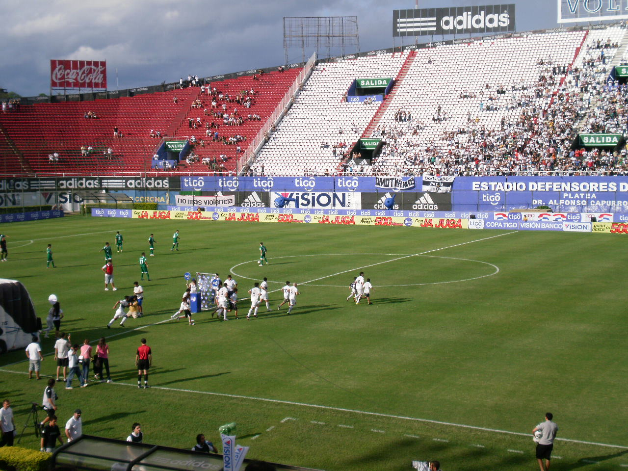 Vista del estadio Defensores del Chaco durante un partido entre los equipos de Olimpia y 3 de Febrero, que ganó el primero por la cuenta de 3-1, por la fecha #11 del torneo Apertura paraguayo.